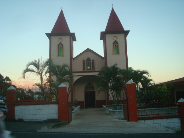 Templo católico de Barbacoas de Puriscal, Costa Rica. Este templo es patrimonio arquitectónico del país.